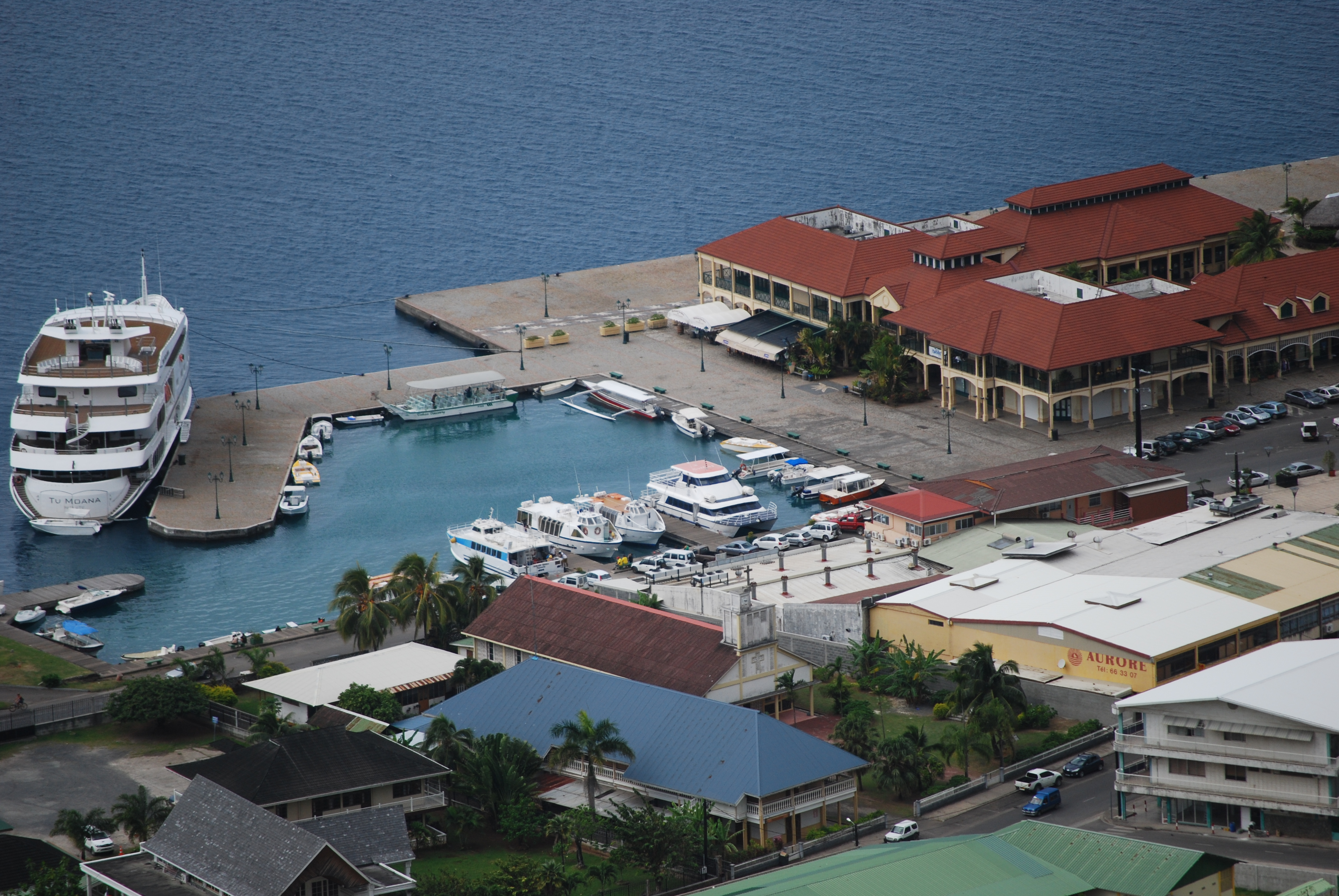 Photo du port de la ville d'Uturoa à Raiatea